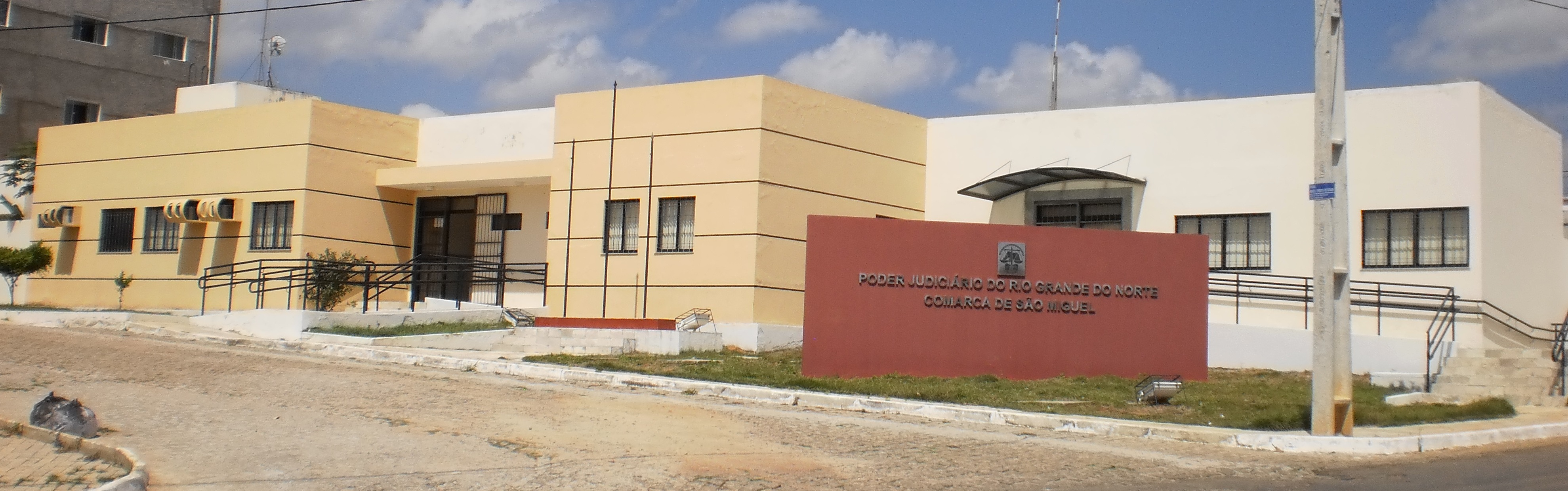 Fórum da Comarca de São Miguel (RN), do Poder Judiciário do Rio Grande do Norte (Brasil).